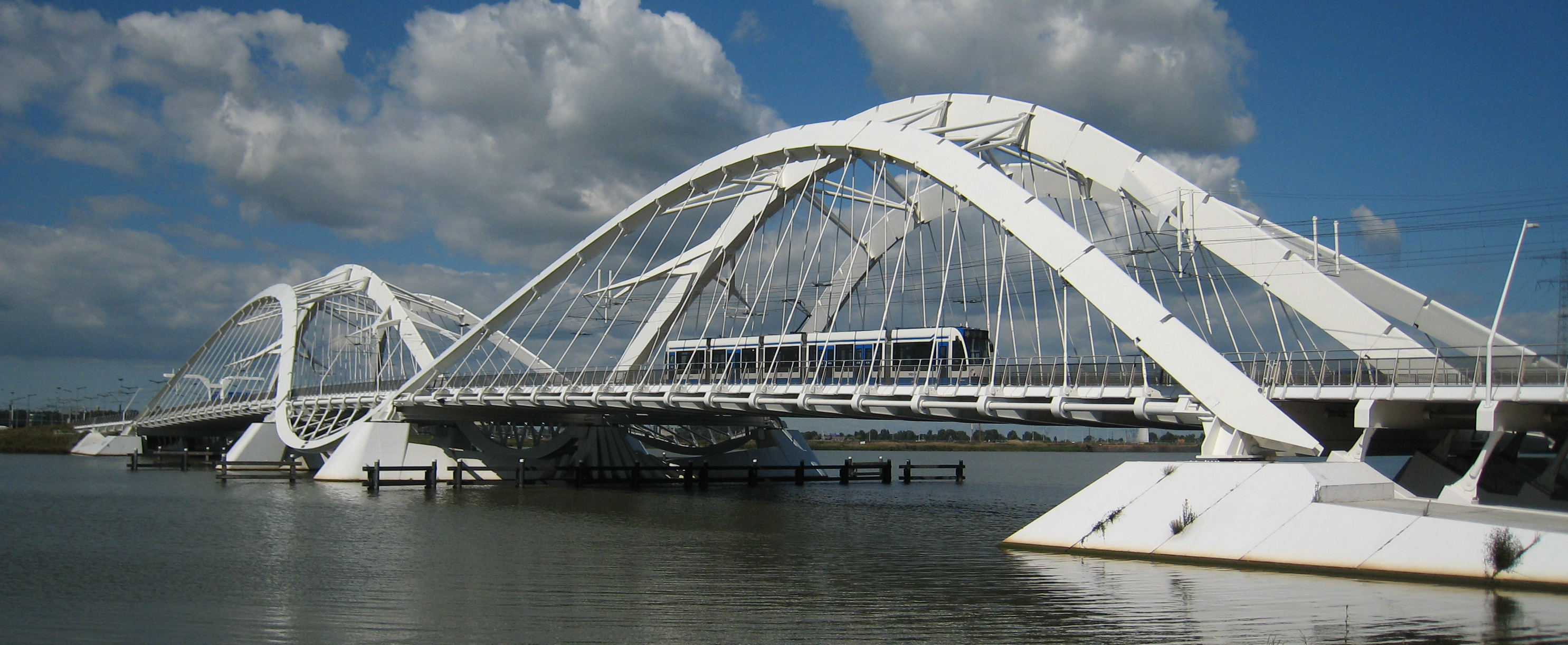 Enneus Heerma Brug (Enneus Heerma Bridge) in Amsterdam, Holland with IJtram.